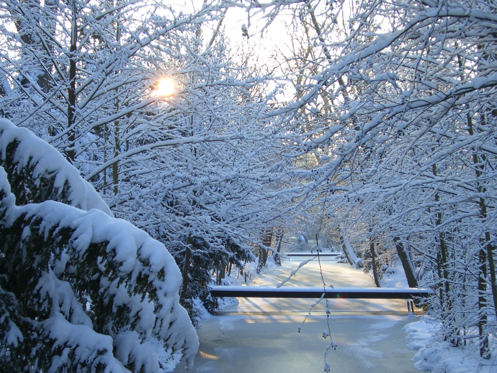 La Vesgre